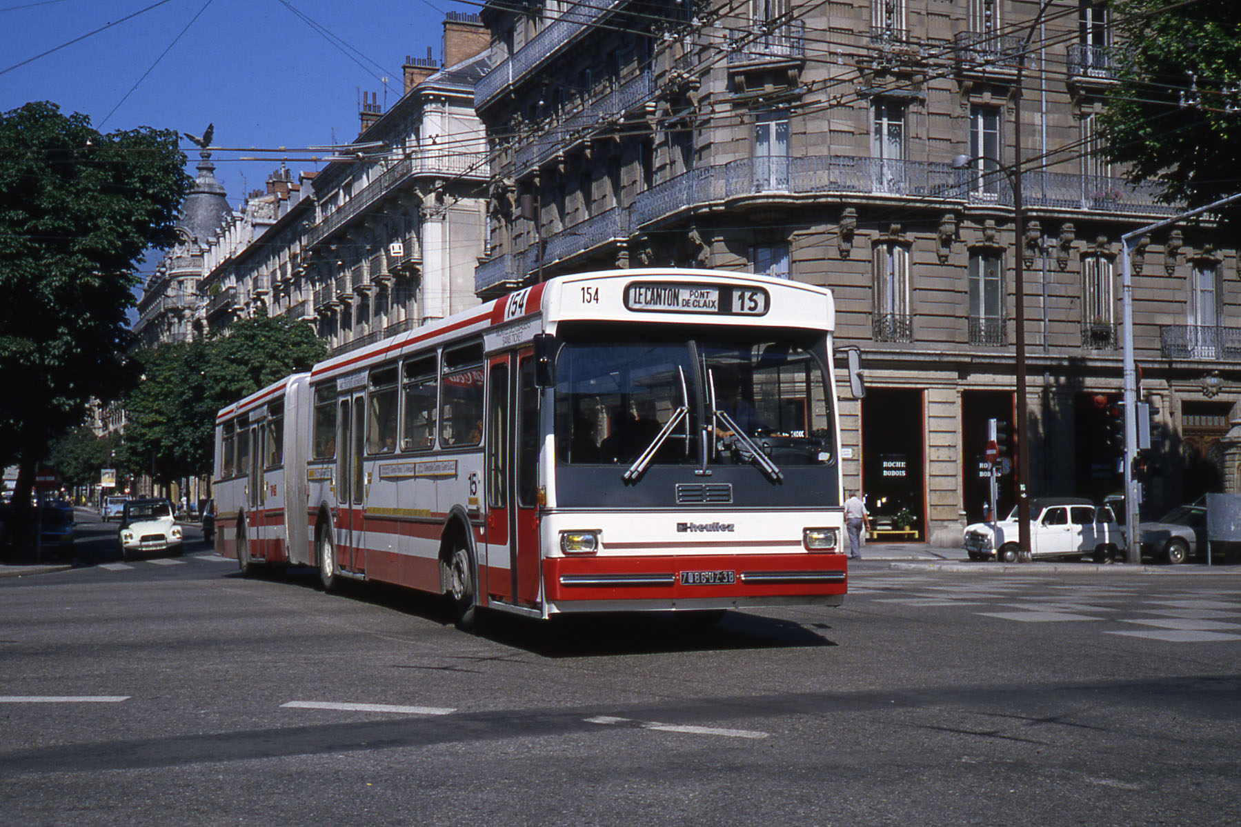 Un Heuliez O 305 G, Avenue Alsace-Lorraine à Grenoble.